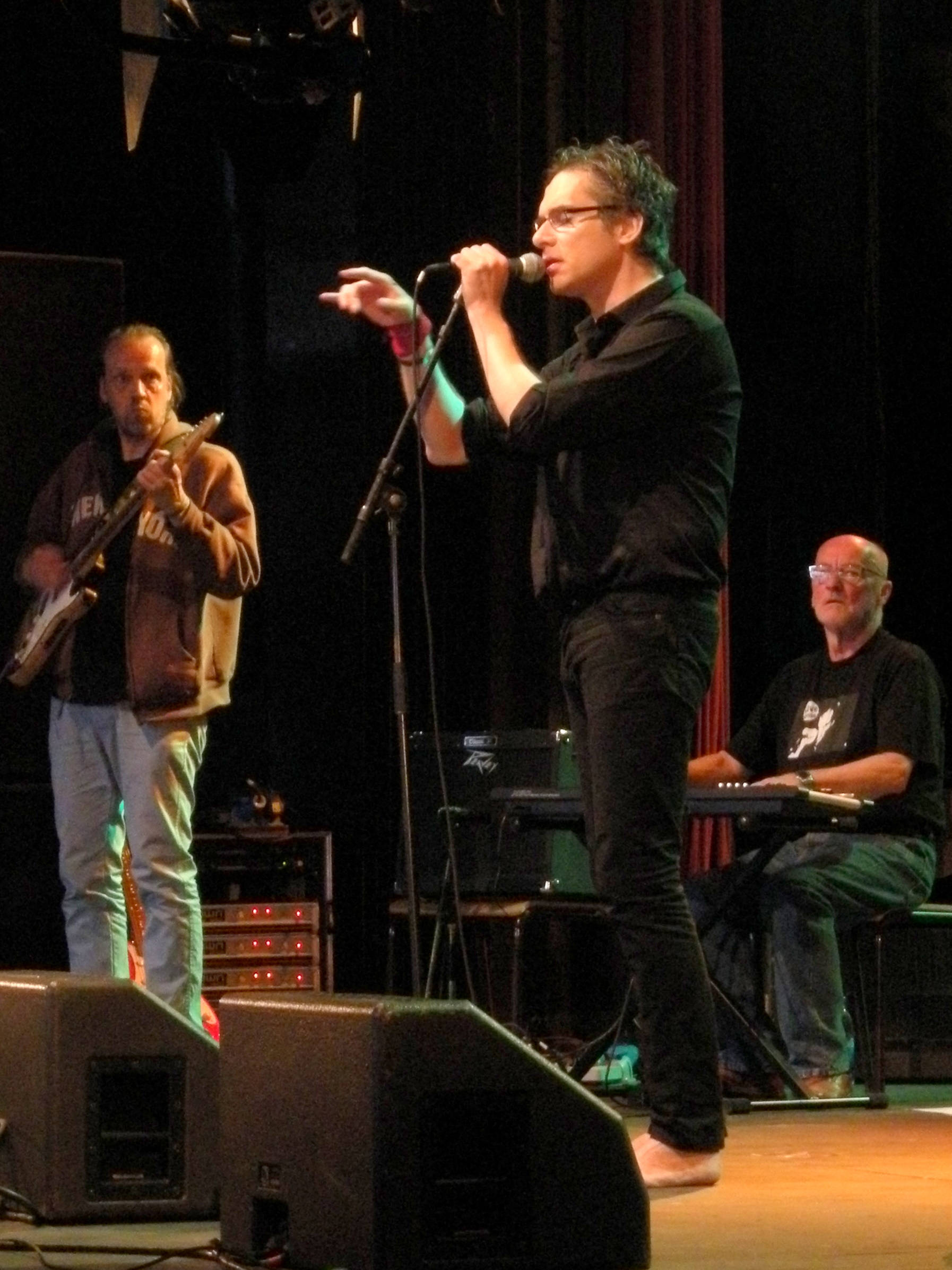 Thorsten Flinck uppträder på Peace and Love i Borlänge 2010